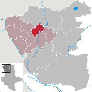 (Original text: Kuhfelde im Landkreis Salzwedel)